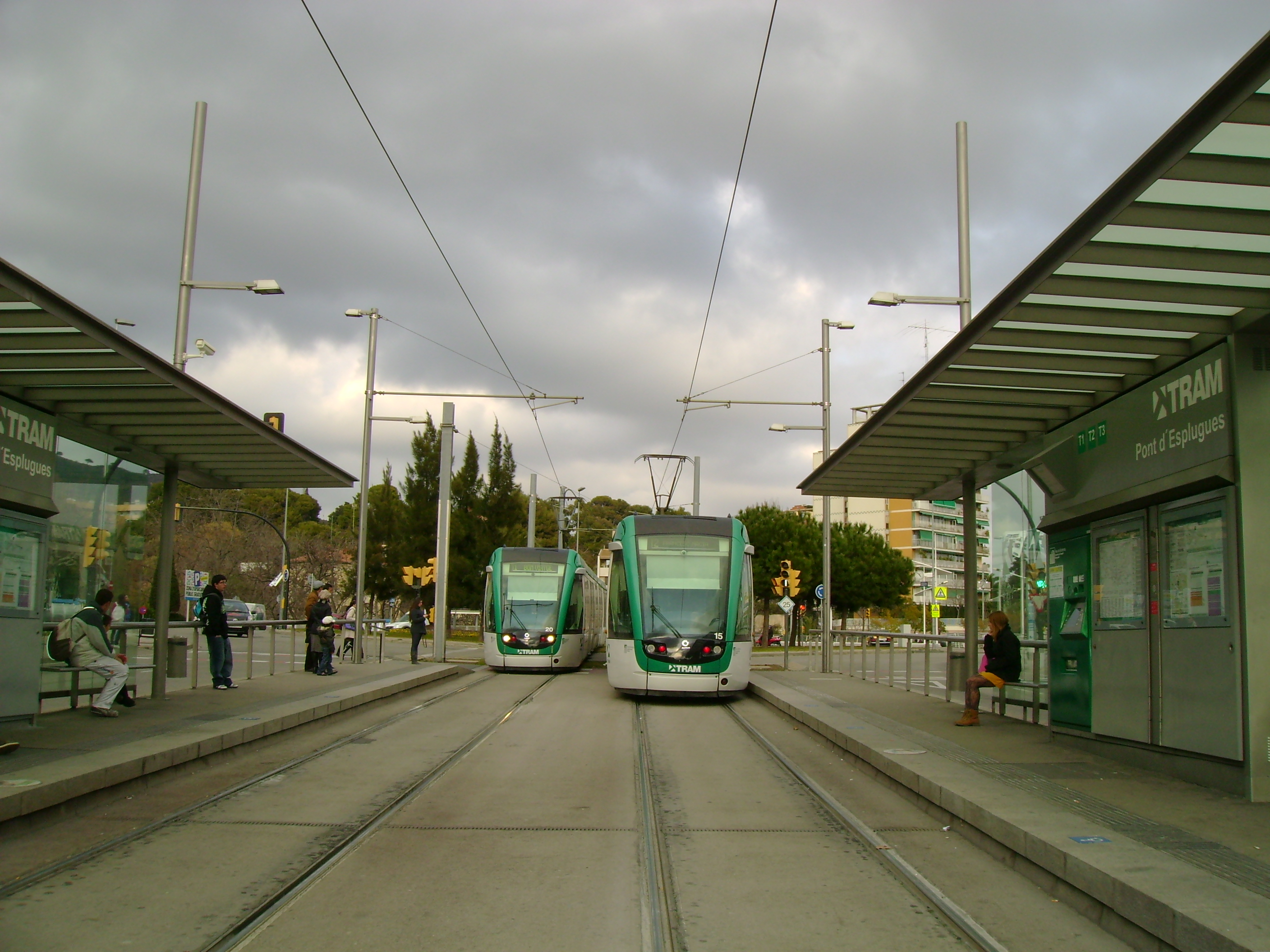 Foto capturada per la meva càmara a l'estació de Pont d'Esplugues (Trambaix).